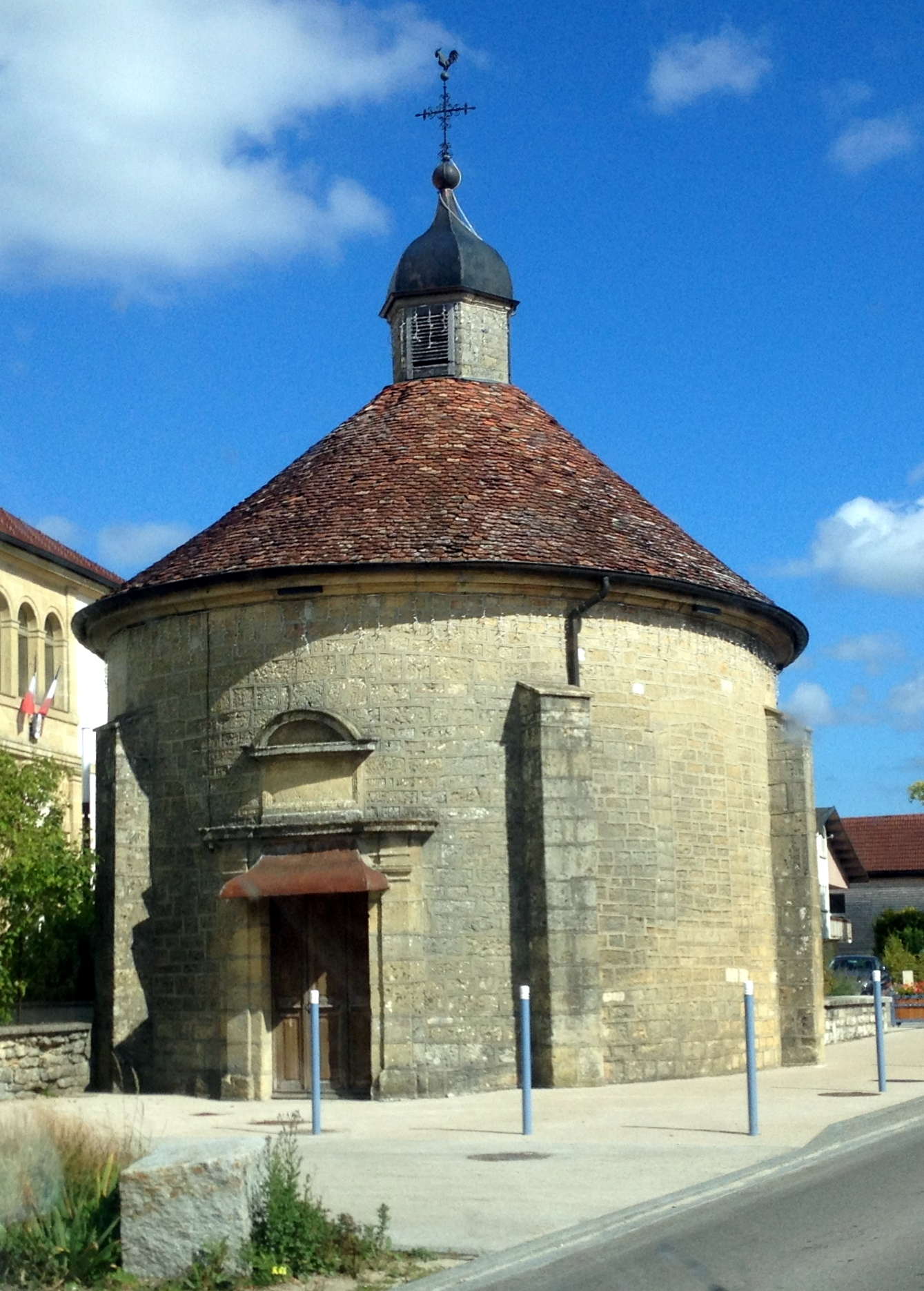 Église Saint-Antoine d'Houtaud.